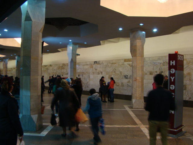 Memar Əcəmi metrostansiyasının içi